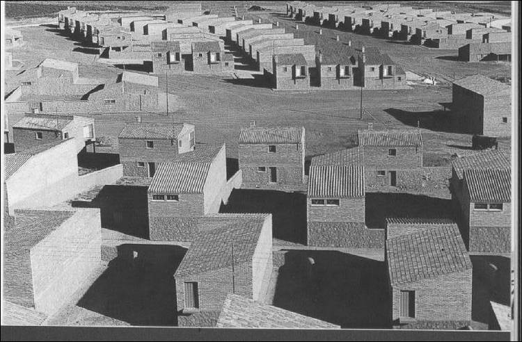 El pueblo de Cañada de Agra recién construido